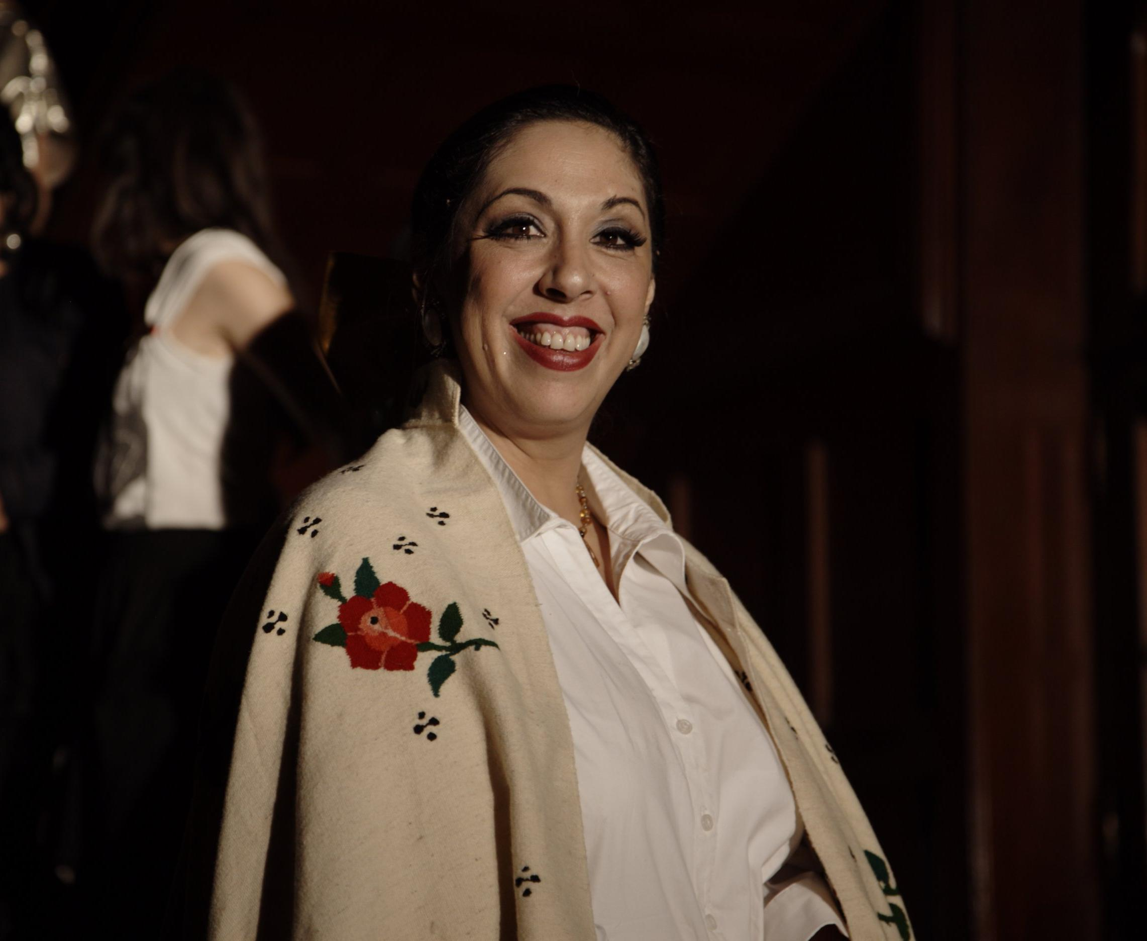 Una de las Corregidoras que tomaron la Ciudad...